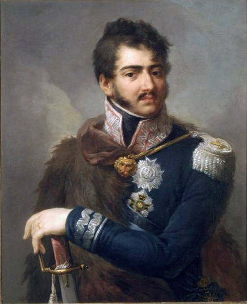 Portrait of Prince Józef Poniatowski.